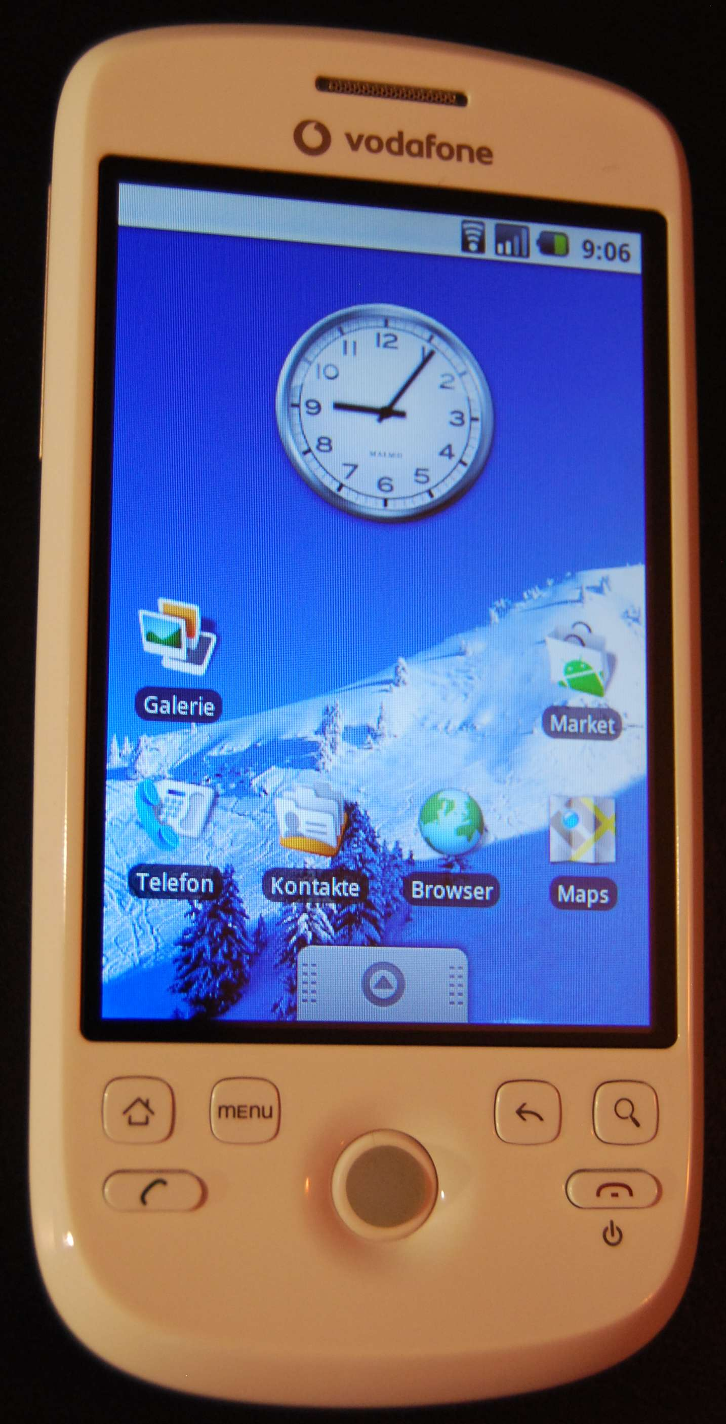 HTC Magic